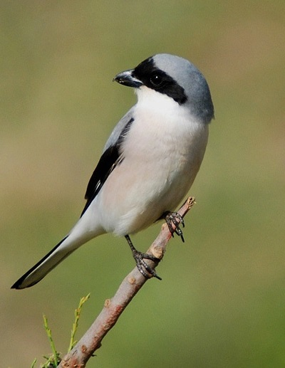 Kurdî: Li Qoruxçînavê Kurdî nehatiye tespît kirin.